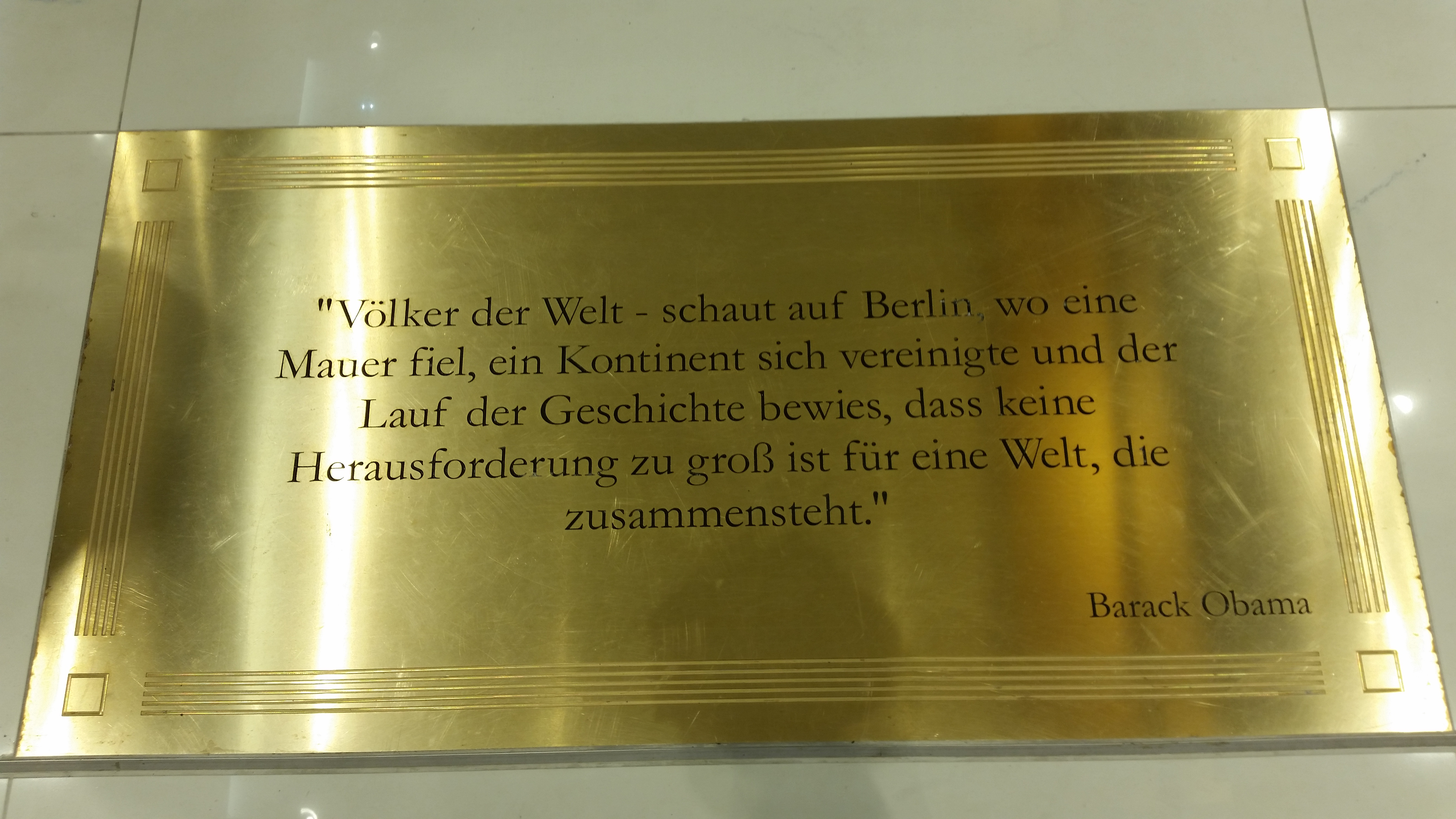 Typische Tafel vor den Rolltreppen im Mall of Berlin, mit historischen Sätzen der Geschichte.